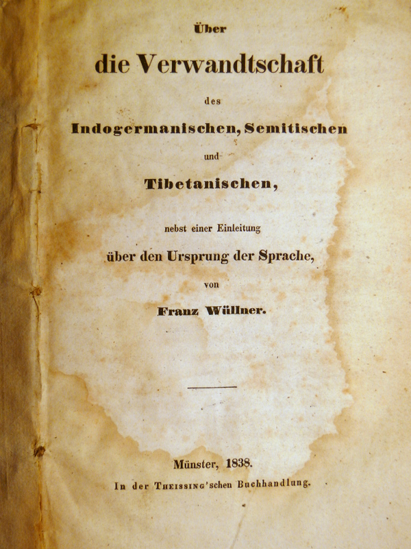 Reproduktion des Titelblattes eines Werkes aus 1838. Original im Privatbesitz von Benutzer:Orientalist